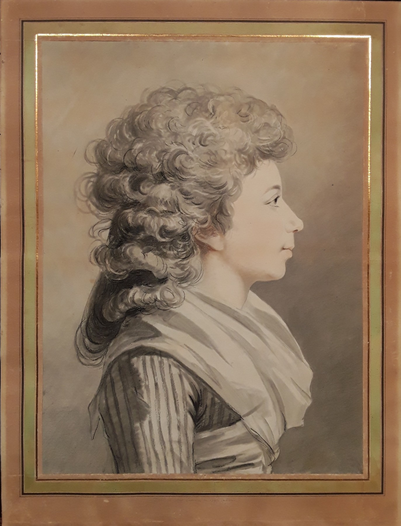 Constance Véry de la Pierre, baronne Lézurier de la Martel